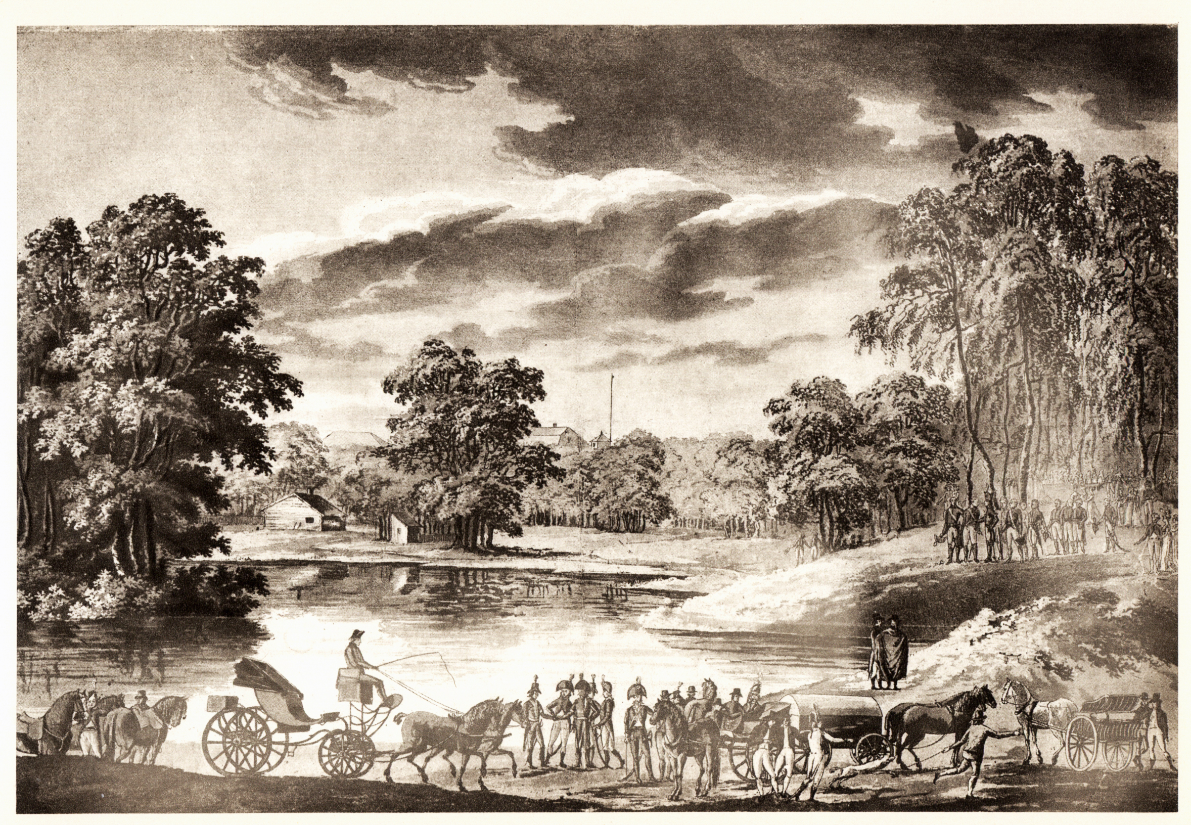 Medevi brunn 1798. »Utsigt af en Lust park vid Medevi, där H. Maj:t Konung Gustaf IV Adolph under sin Brunnscur 1798 täcktes gifva en gouté åt samtelige Brunsgästerna, den Hans Kongl. Maj.t sjelf bevistade.» Festen hölls vid den romantiska dammen i engelska parken vid Medevi säteri; pä en udde i dammen underhåller sig konungen med sina gäster, medan betjänterna dröja sig vid vagnparken i förgrunden. Akvatintagravyr av Carl Fredrik Akrell 1803 efter teckning av C. J. Fahlcrantz. Kungliga biblioteket.